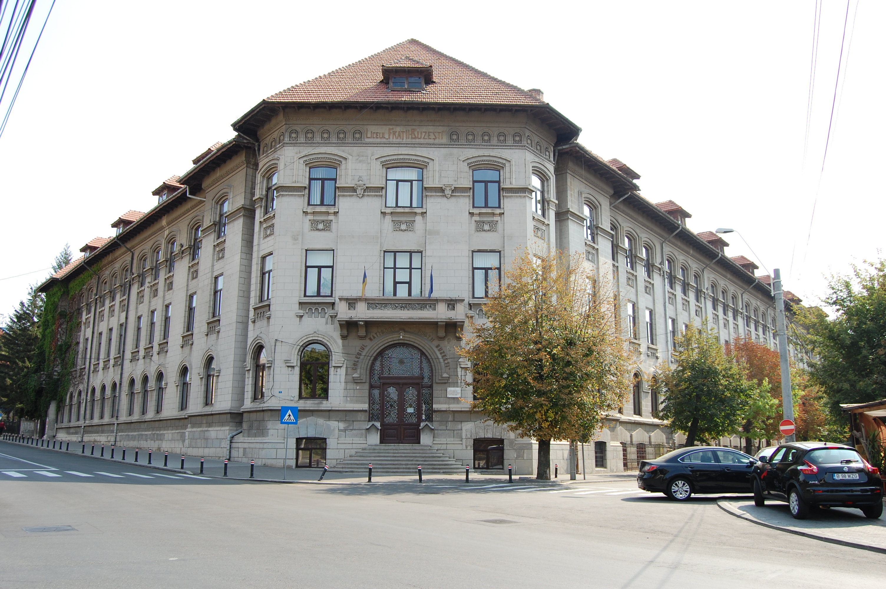 liceul Fratii Buzesti, 1882